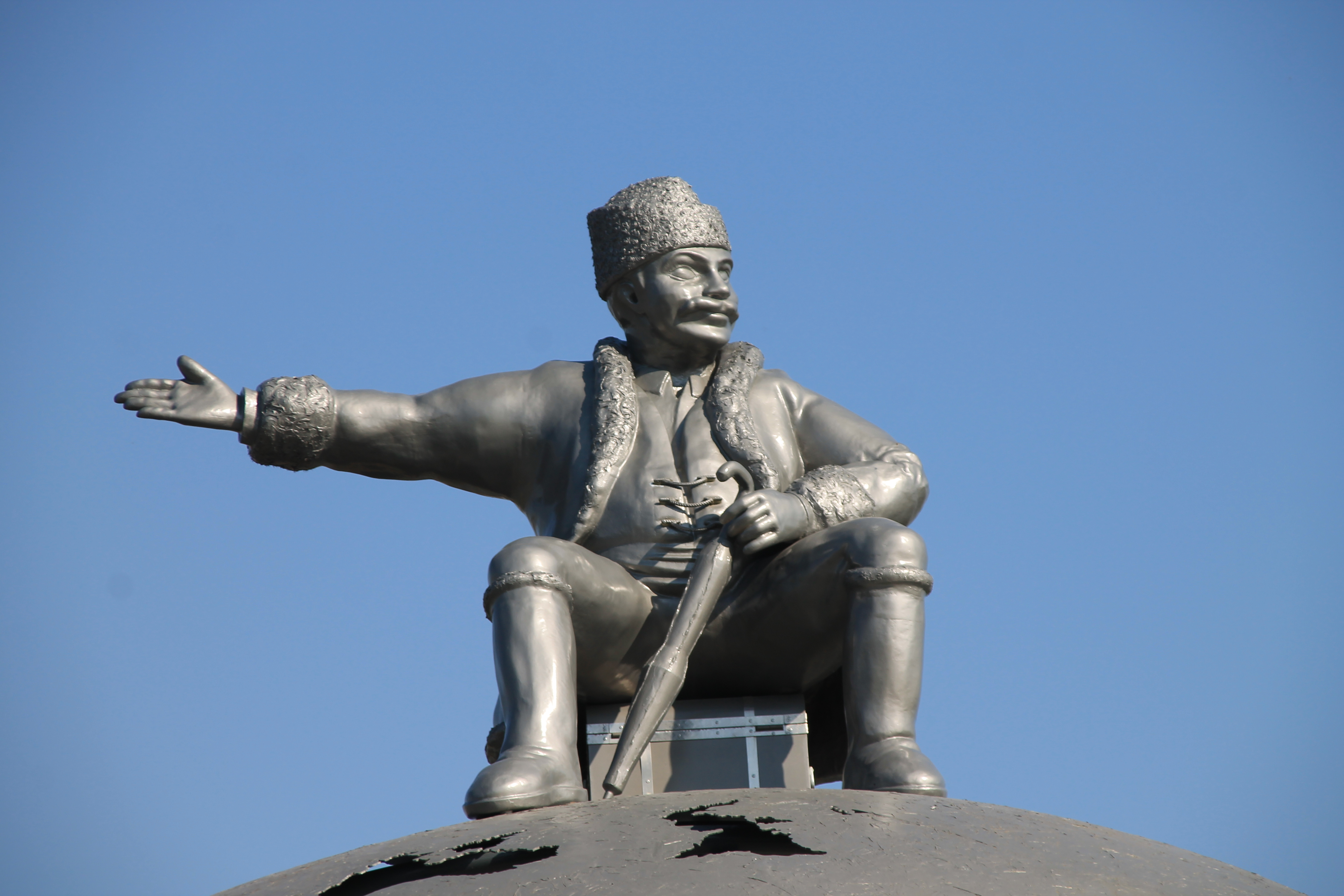 Spomenik Jovanča